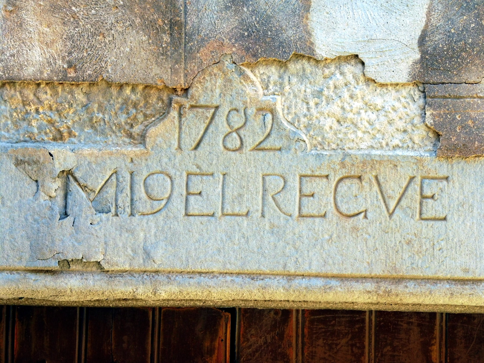 Cal Regué de Concabella (els Plans de Sió): llinda del portal